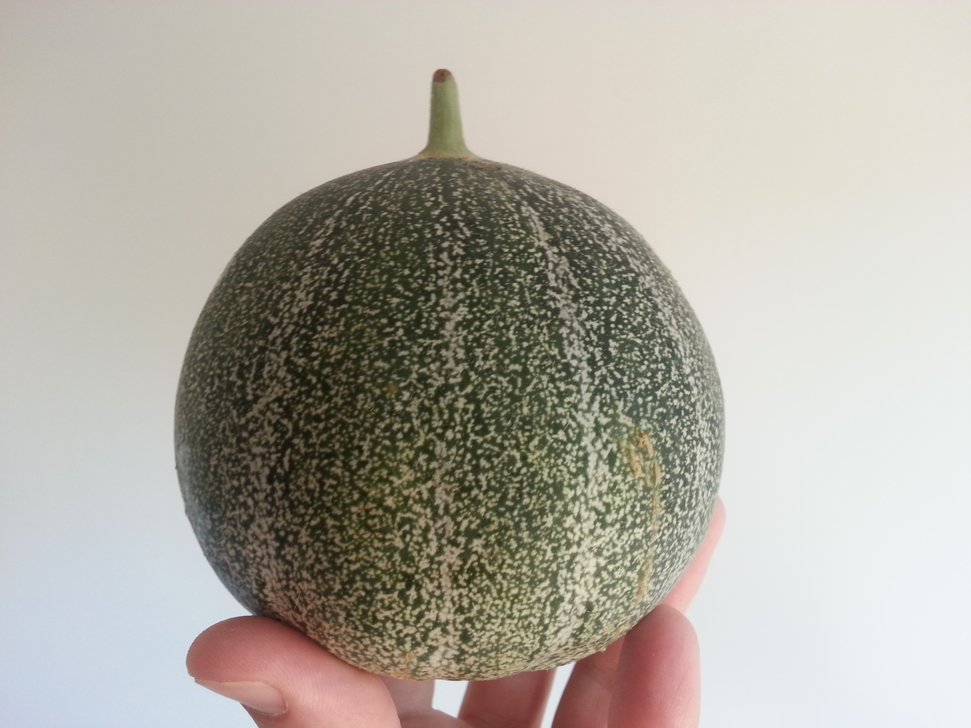 Melon spécialité du pays de Rennes, à la robe verte tachetée de gris.